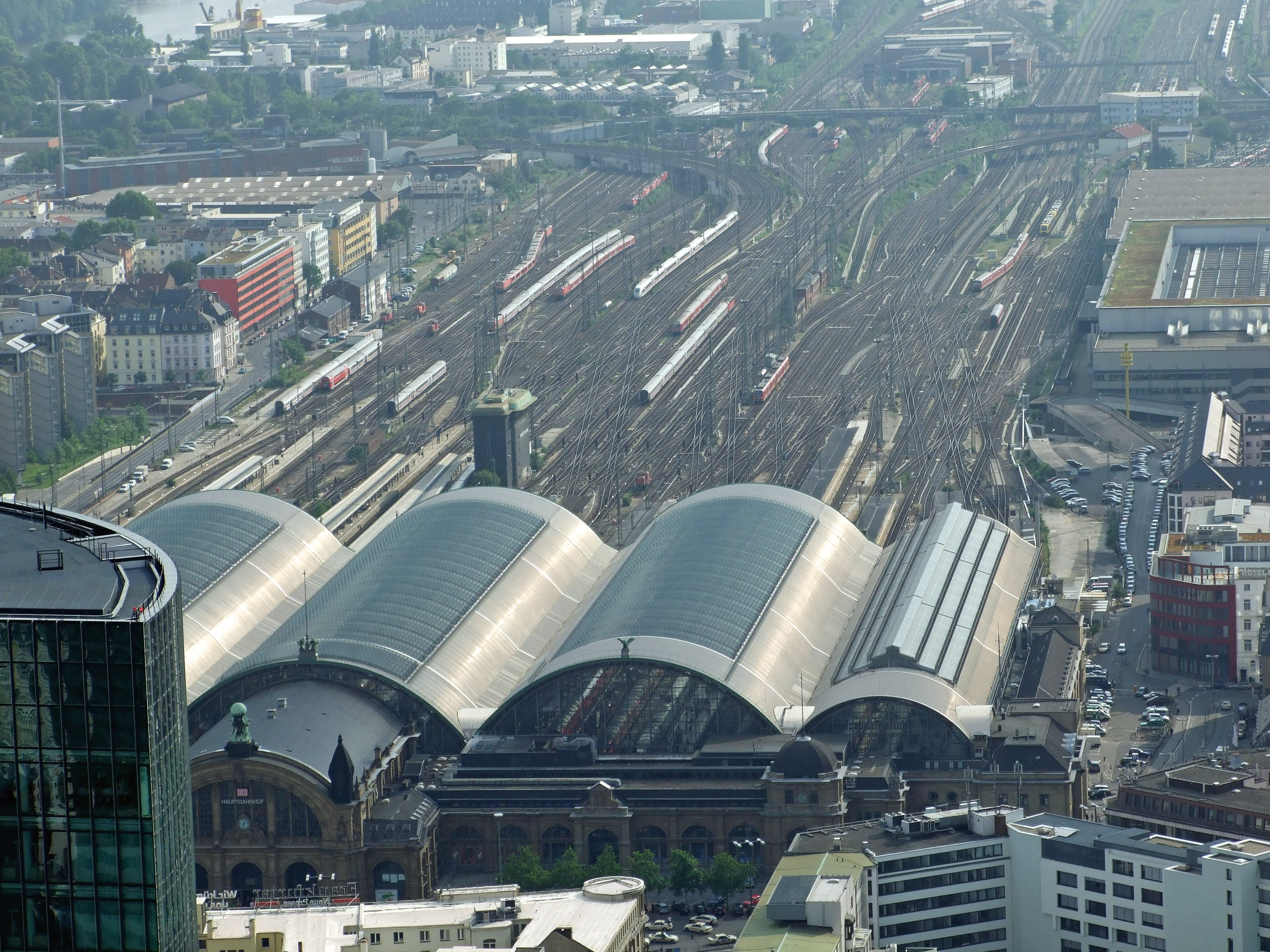 Bahnverkehr auf den Gleisen zum Hauptbahnhof in Ffm.